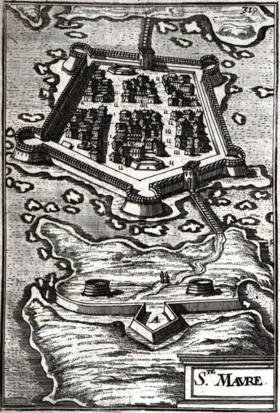 "De la Fortification des places turques." "S[ain]te-Maure".